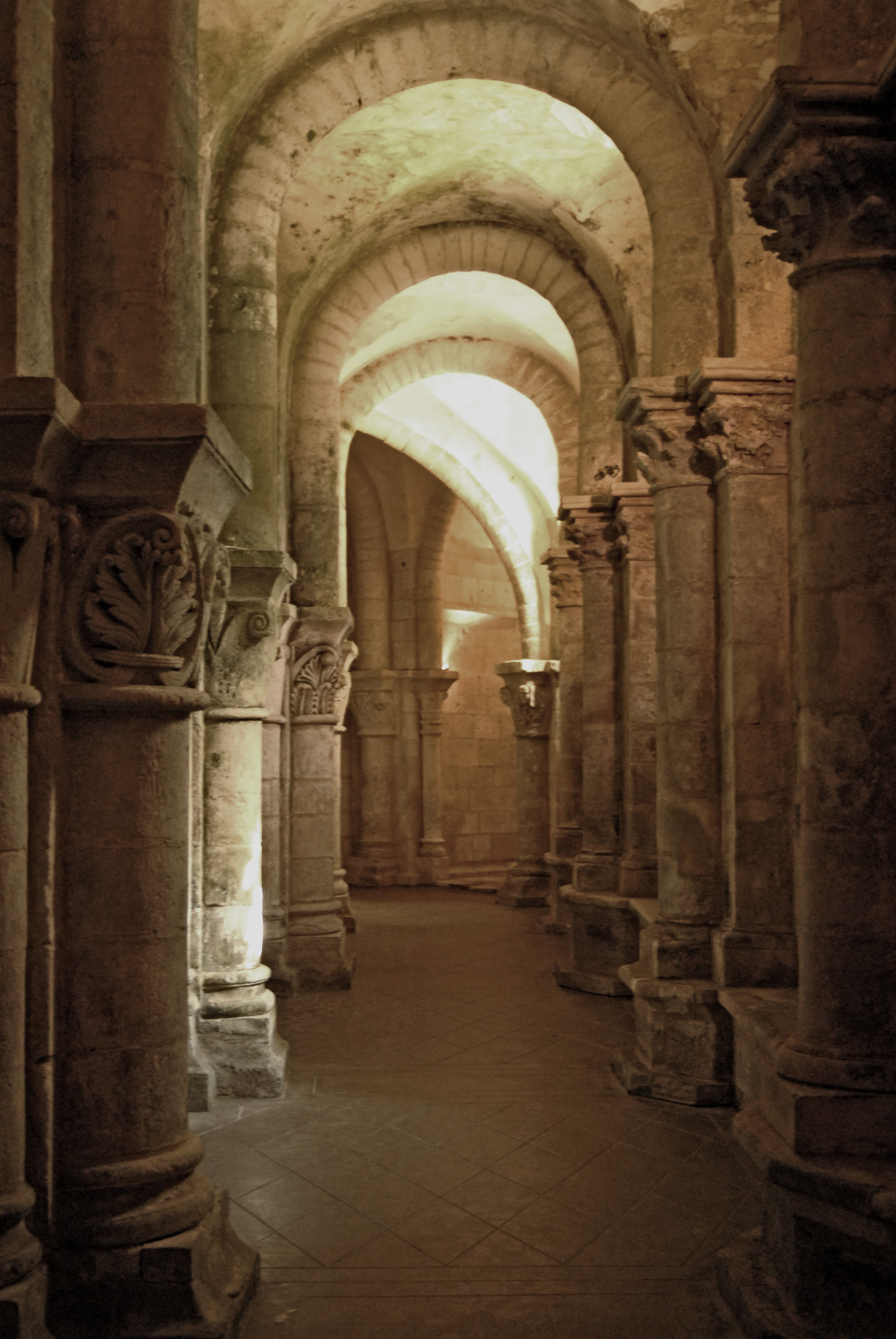 St.-Eutrope, Saintes, Krypta, südl. Seitenschiff